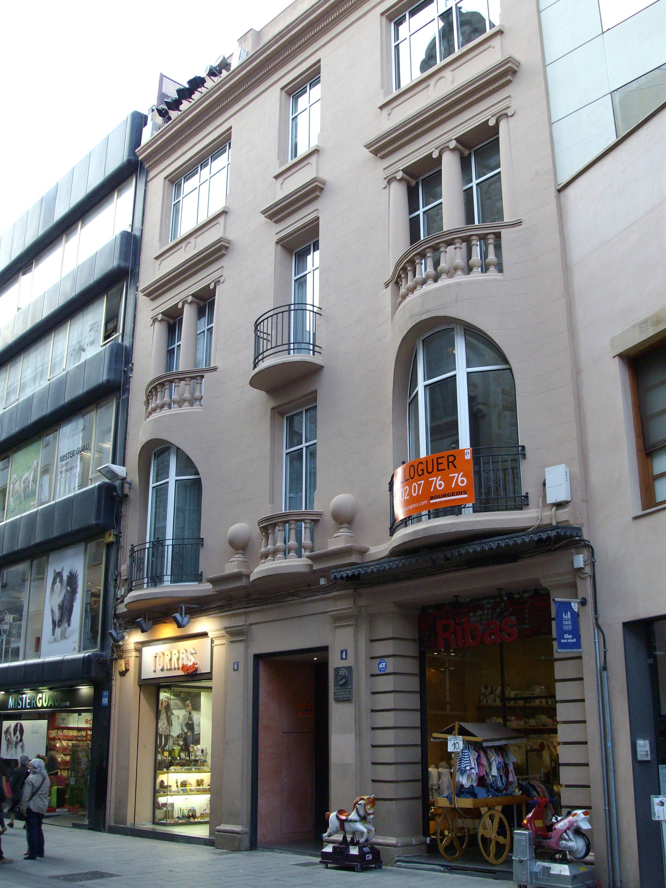 Casa Ramón Costajussà. Edificio construido por Josep Renom i Costa entre 1919 y 1920, situado en la calle Gràcia, 4-6, de Sabadell, Barcelona (España). En esta casa vivió desde 1929 hasta 1986 Mn. Camil Geis, sacerdote, músico y poeta, tal y como indica la placa que hay en la fachada.